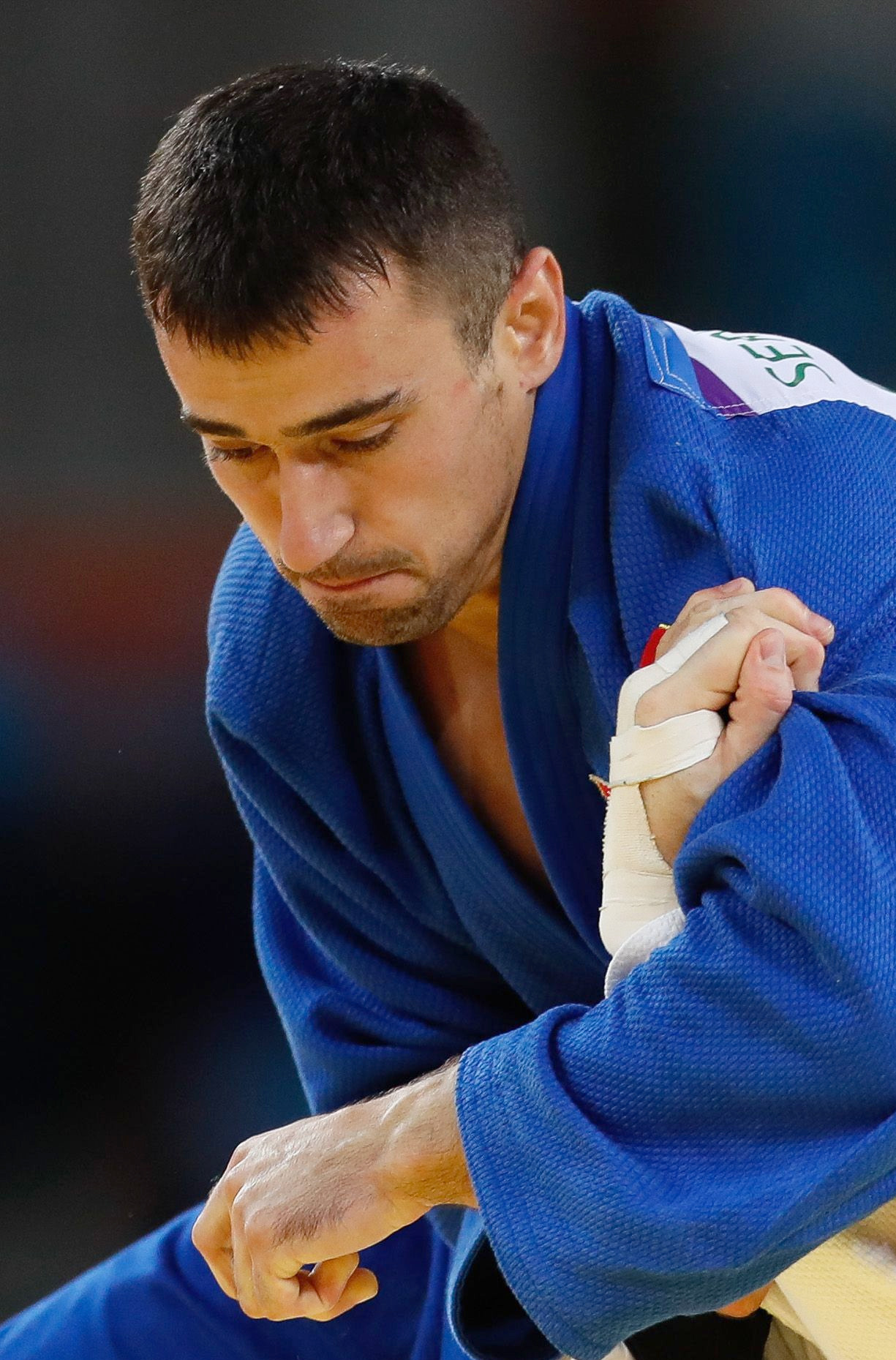 Judô na Arena Carioca dos Jogos Olímpicos Rio 2016 Rio de Janeiro - Victor Penalber, do Brasil, Г© eliminado por Sergiu Toma, dos Emirados ГЃrabes Unidos, na categoria atГ© 81kg do judГґ masculino na Arena Carioca dos Jogos OlГ­mpicos Rio 2016. (Fernando FrazГЈo/AgГЄncia Brasil)